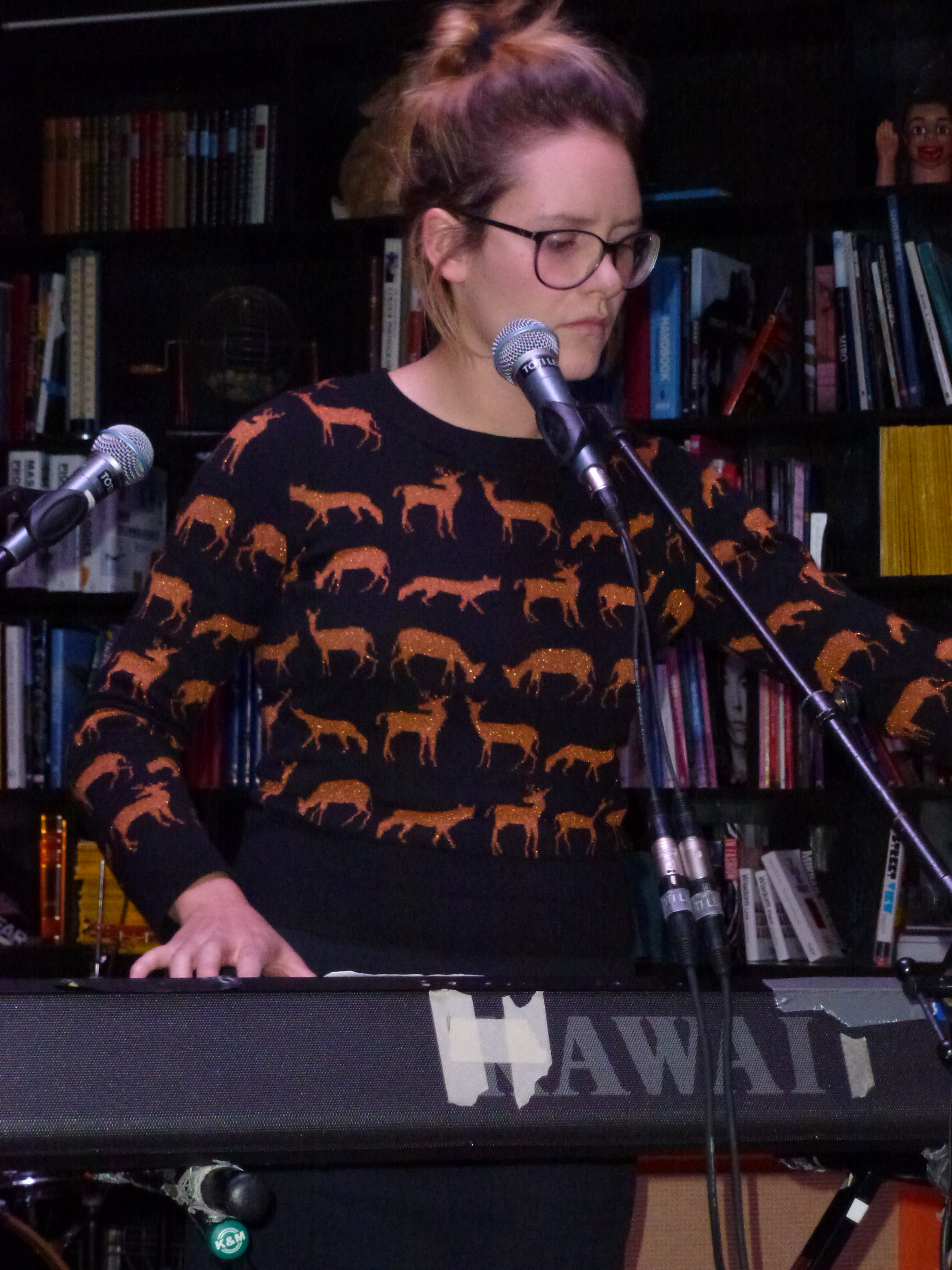 Солей Стефансдоттир (англ. Sóley Stefánsdóttir) играет на пианино.